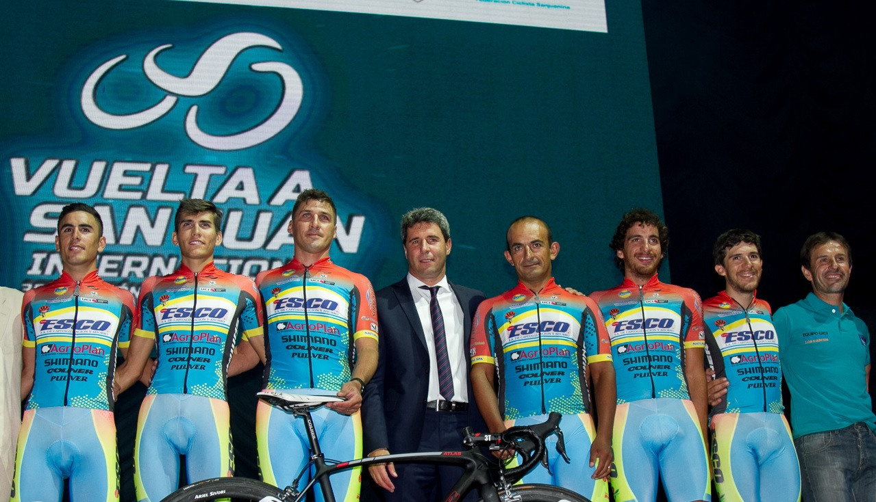 Vuelta a San Juan 2017 - Equipo Los Cascos Esco-Agroplan (Argentina) Depicted team: Los Cascos Esco-Agroplan